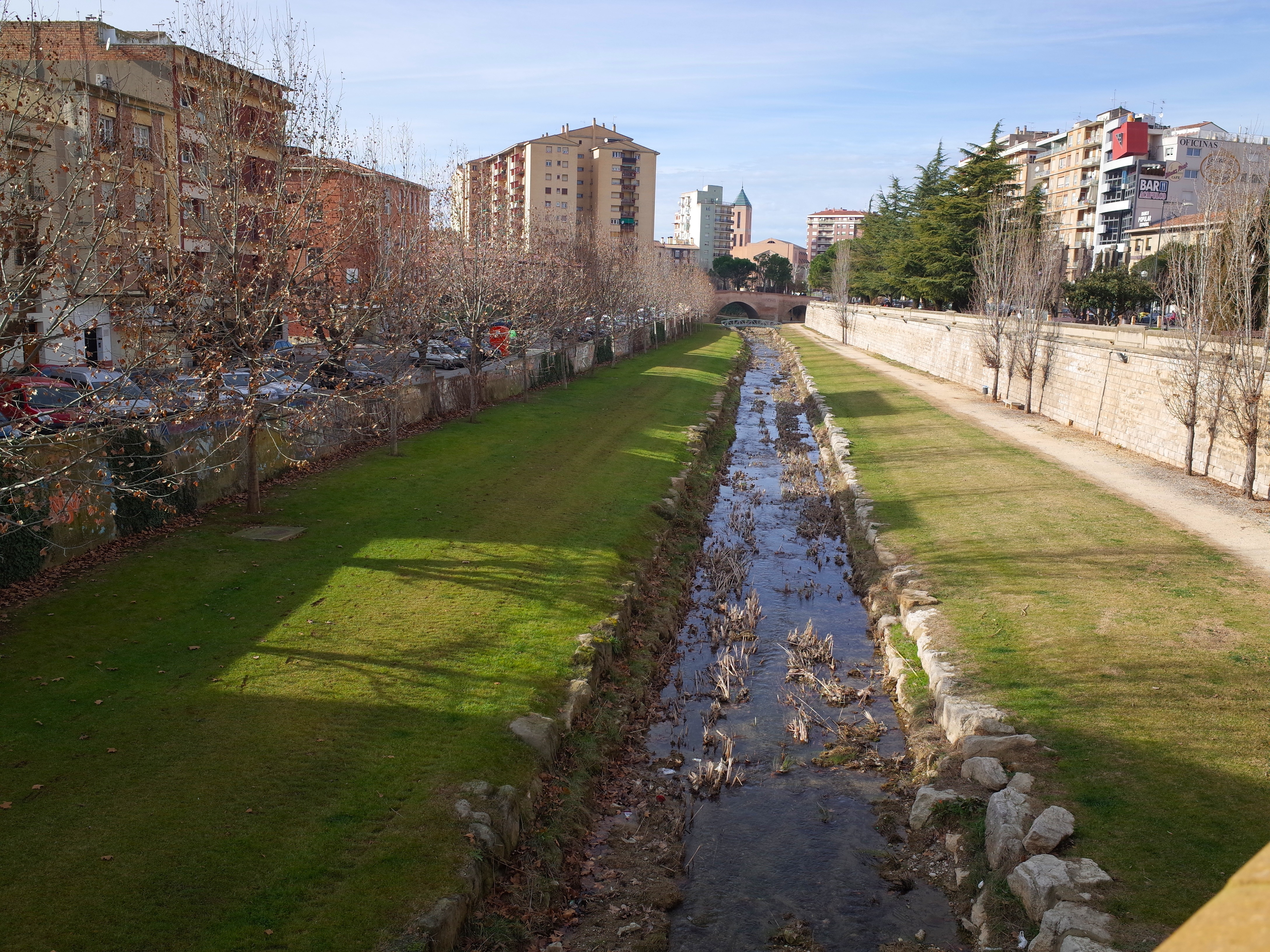 Monzón, provincia de Huesca, España.